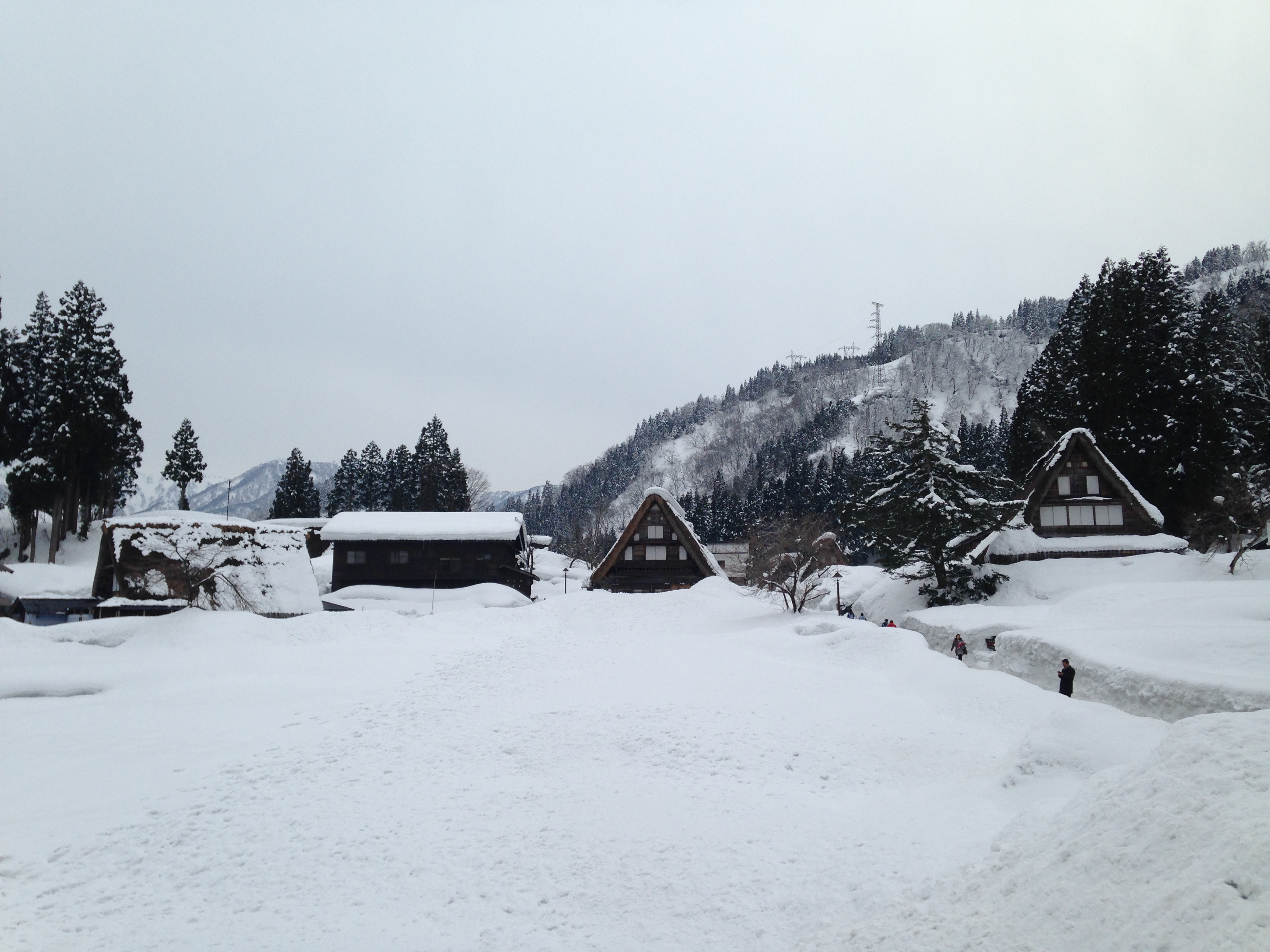 五箇山・相倉集落の雪景